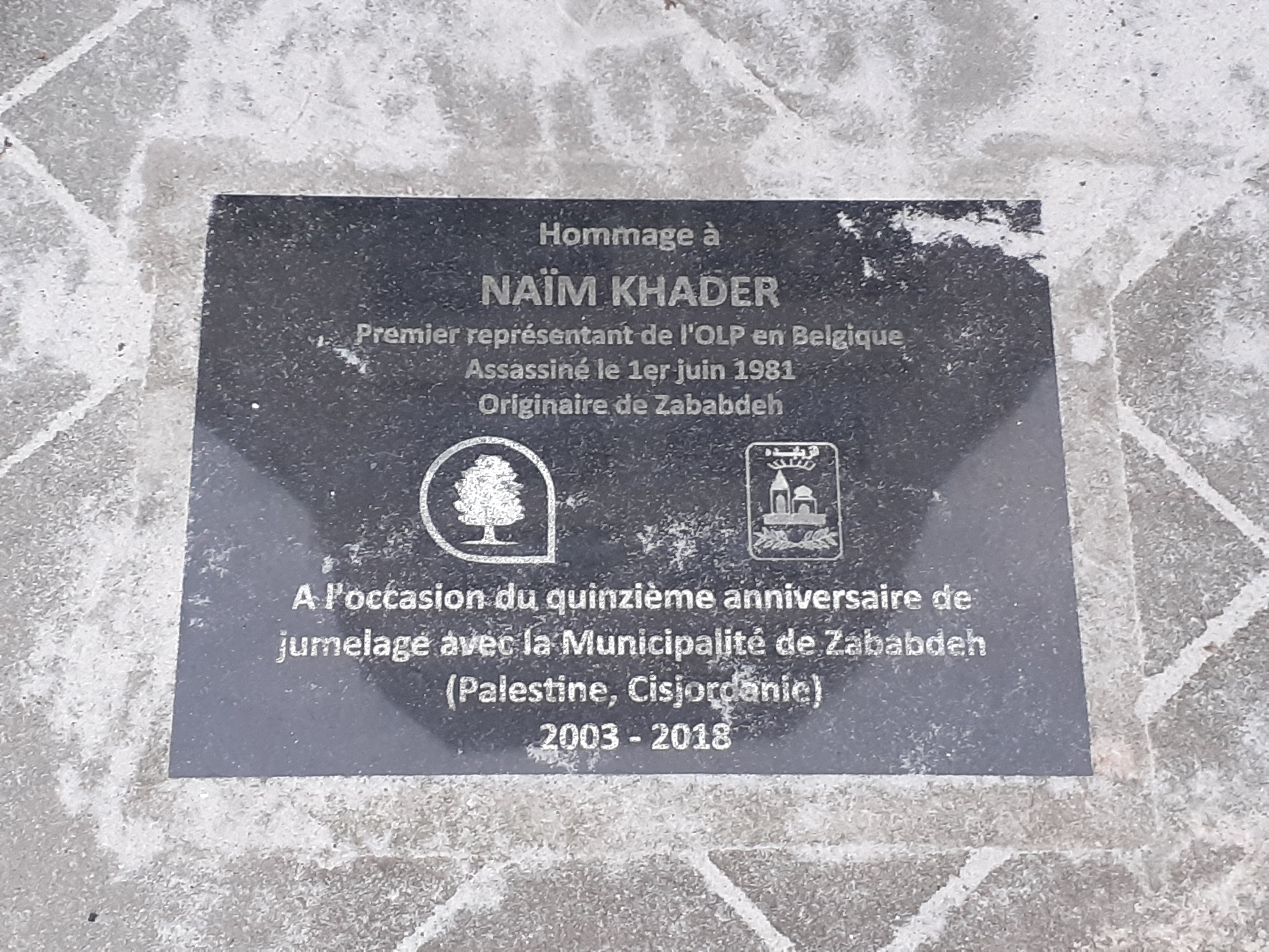 Plaque à Naïm Khader, rue Pesage / Scarabées, Ixelles